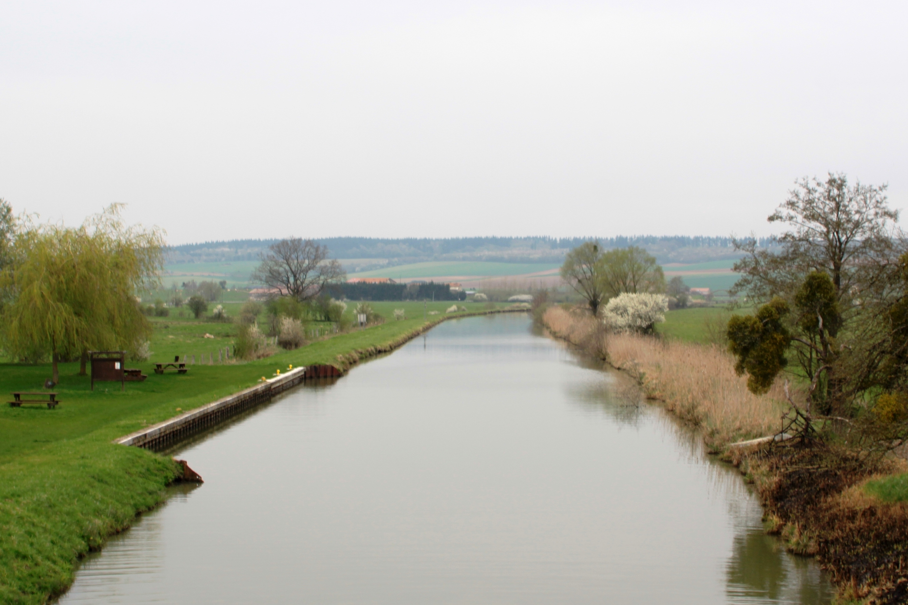 Le Canal des Ardennes près de La Cassine